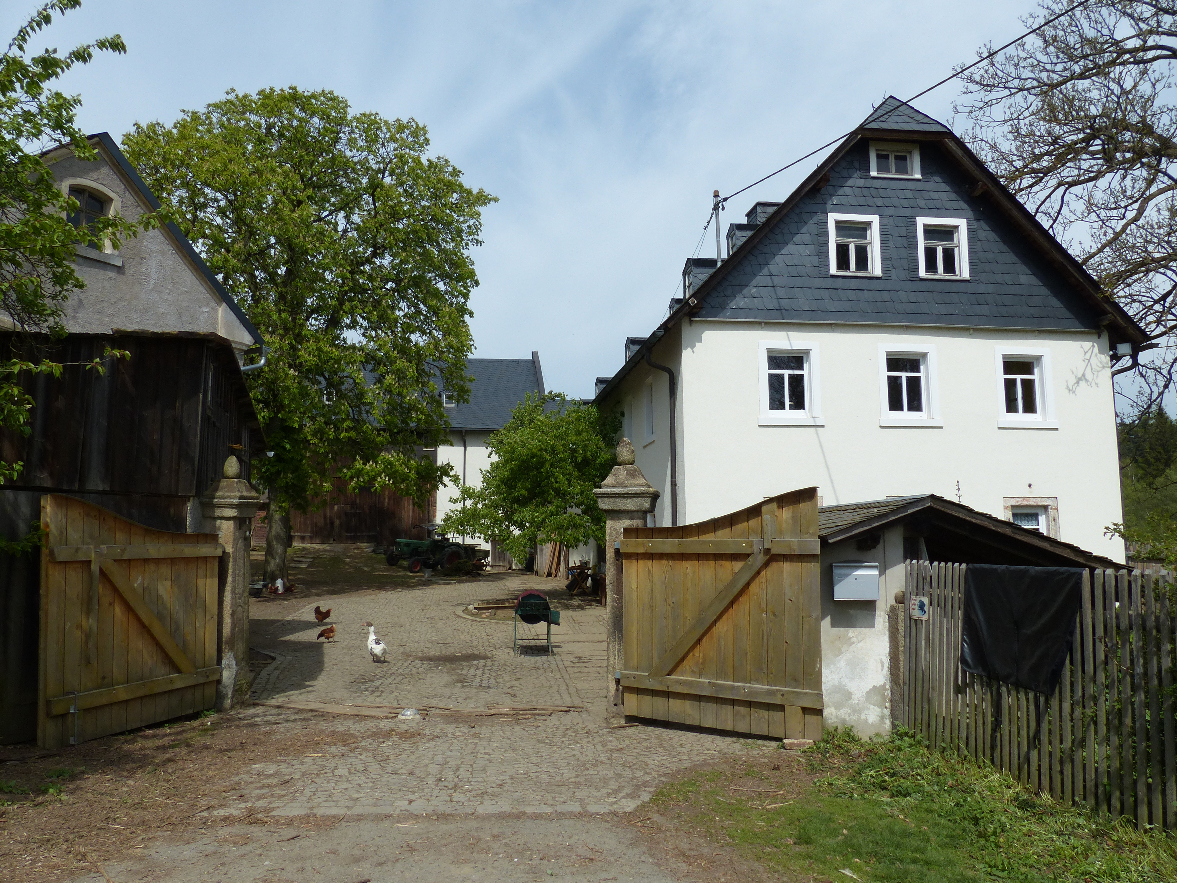 Ansicht von Posterlitz